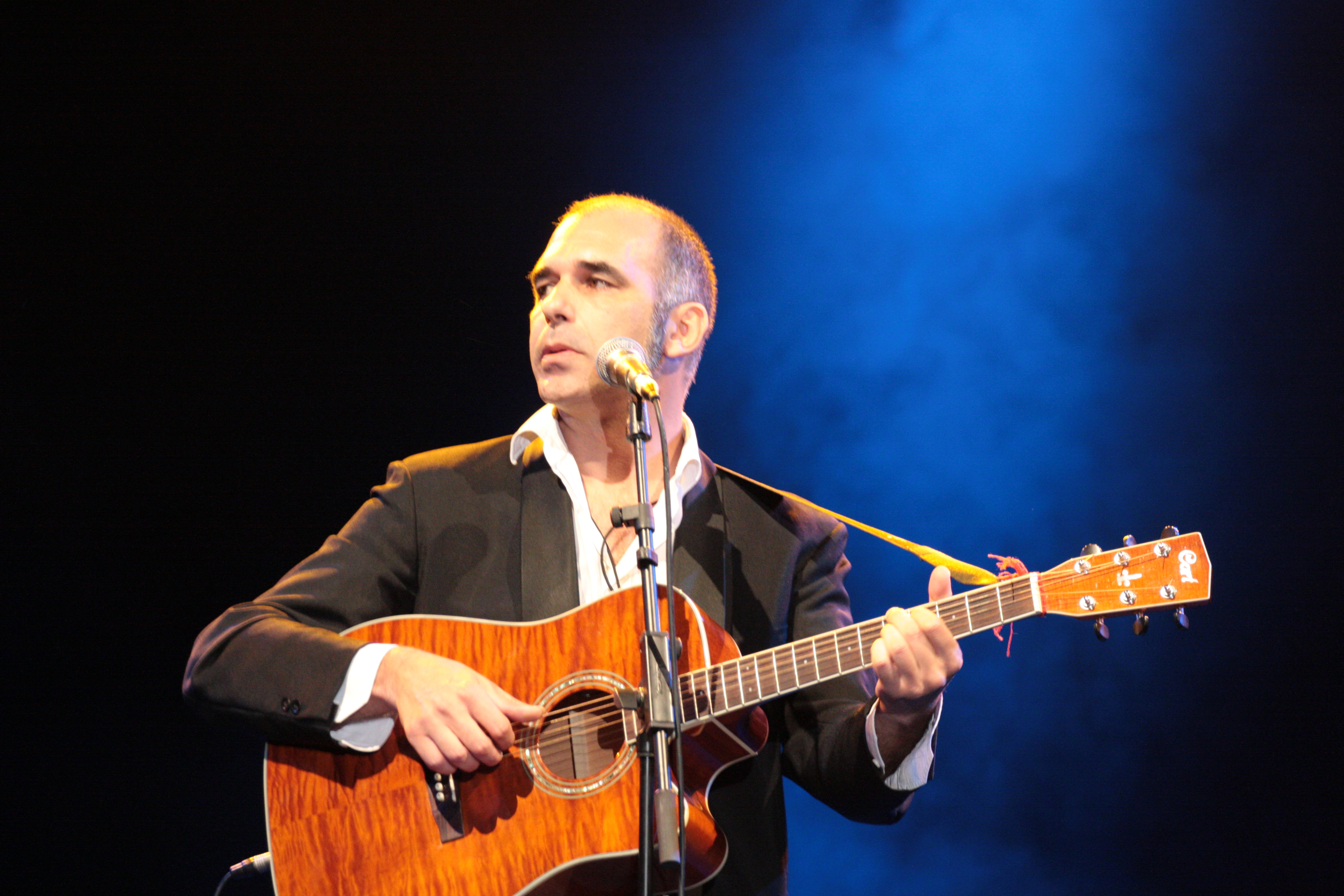 Foto di Alberto Macaluso